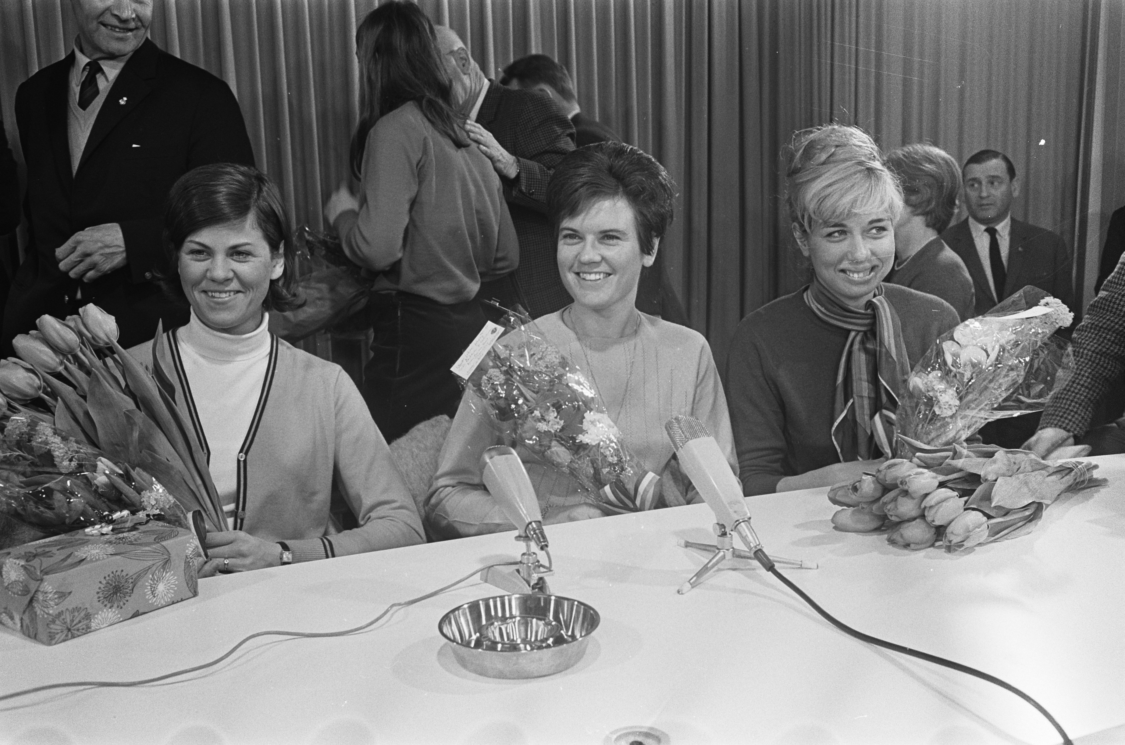 Collectie / Archief : Fotocollectie Anefo Reportage / Serie : [ onbekend ] Beschrijving : Aankomst Damesschaatsploeg uit Helsinki, v.l.n.r. Ans Schut , Stien Kaiser en Carry Geysen tijdens persconferentie Datum : 29 januari 1968 Locatie : Helsinki Trefwoorden : Dames, aankomsten, persconferenties, schaatsploegen Persoonsnaam : Carry Geysen, Kaiser, Stien, Schut, Ans Fotograaf : Koch, Eric / Anefo Auteursrechthebbende : Nationaal Archief Materiaalsoort : Negatief (zwart/wit) Nummer archiefinventaris : bekijk toegang 2.24.01.05 Bestanddeelnummer : 921-0309